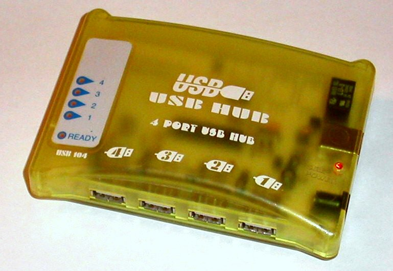 4-Port USB Hub mit eigener Stromversorgung (self powered) (Eisleben, 25. März 2005)